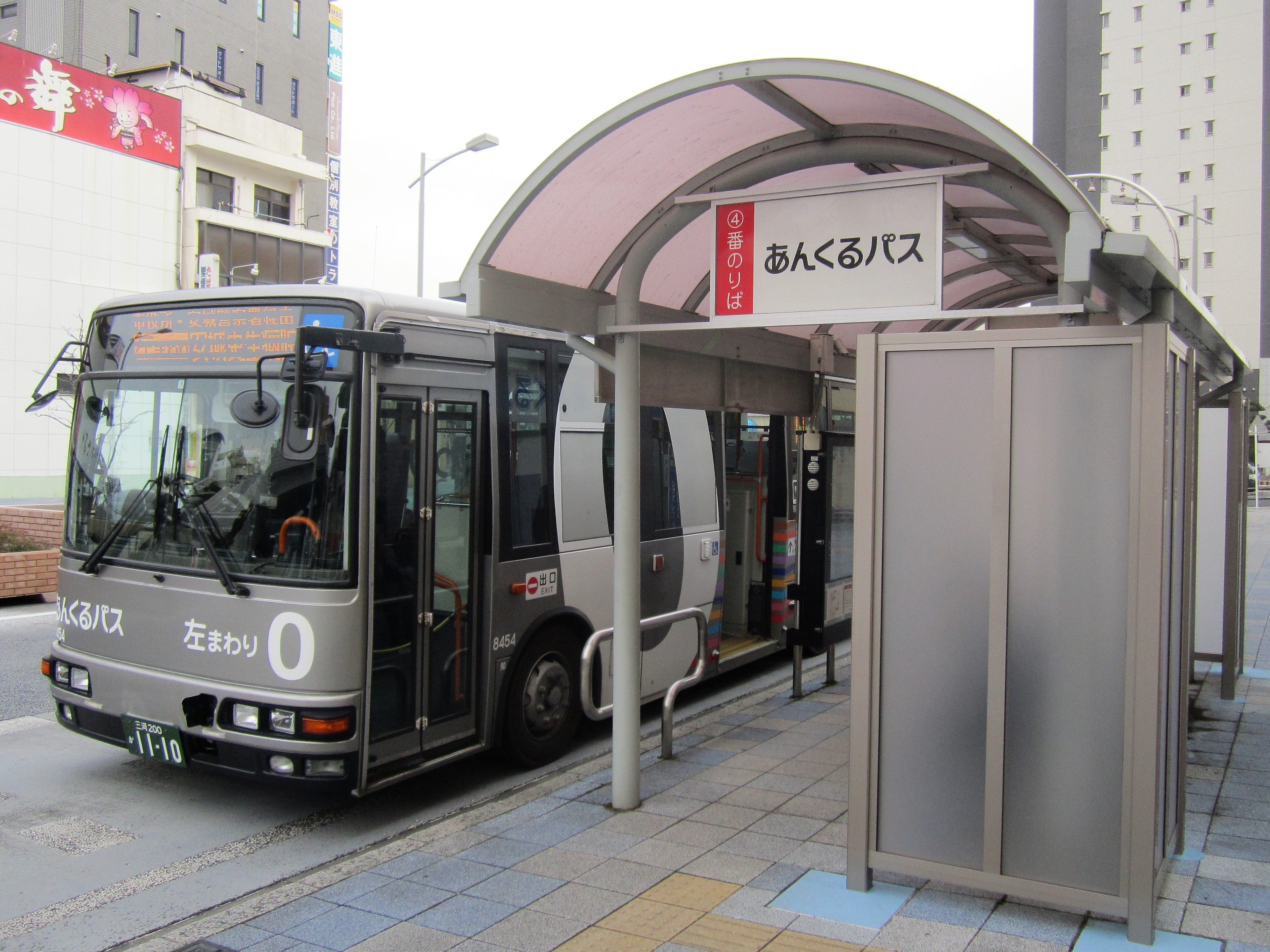 JR安城駅前に停車中のあんくるバス 0番系統 循環線左まわり